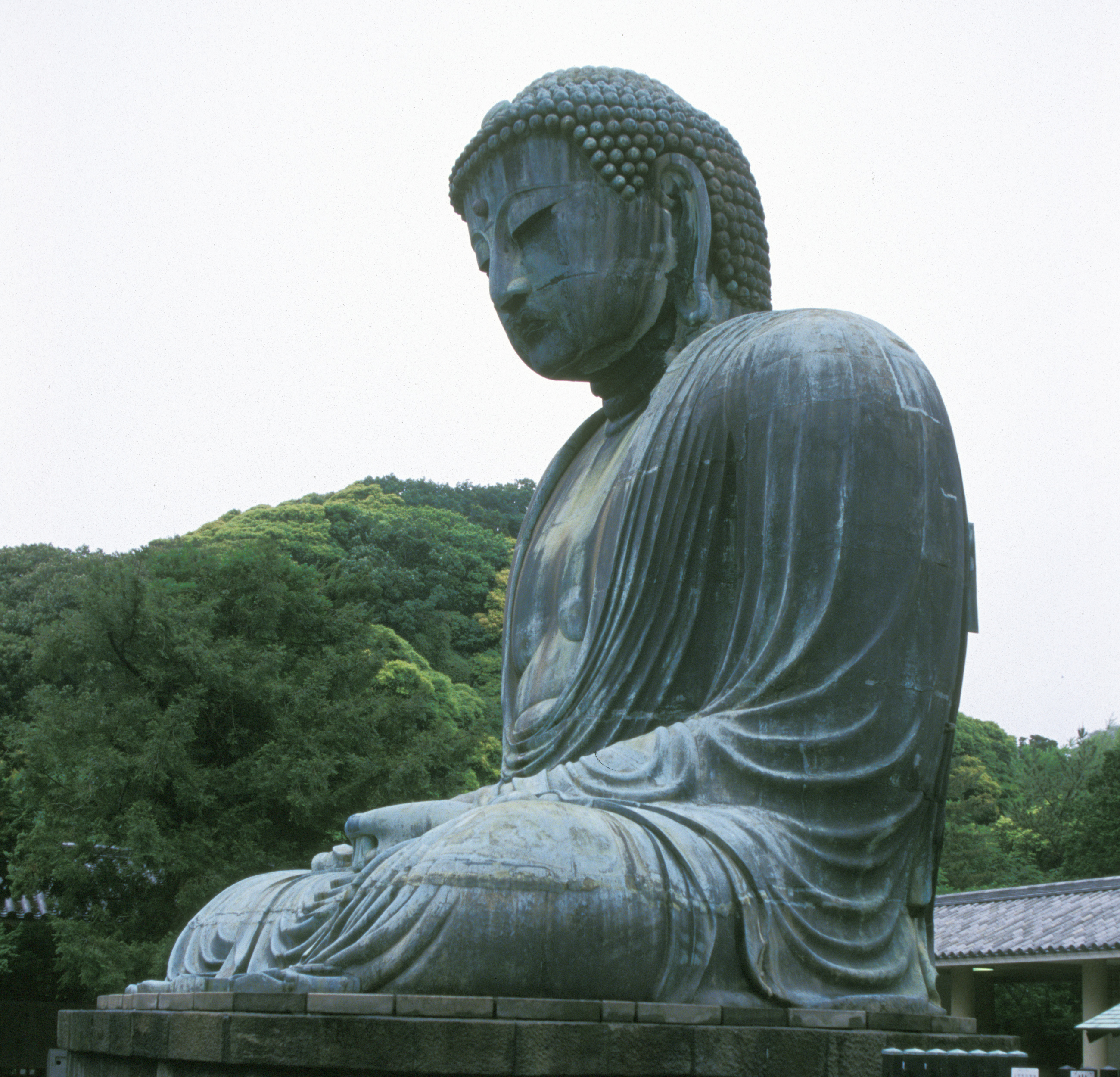 Buddha statue, Kamakura, Japan